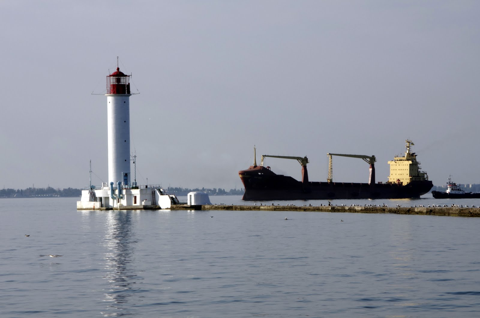 Одеський морський торгівельний порт, Рейдовий мол